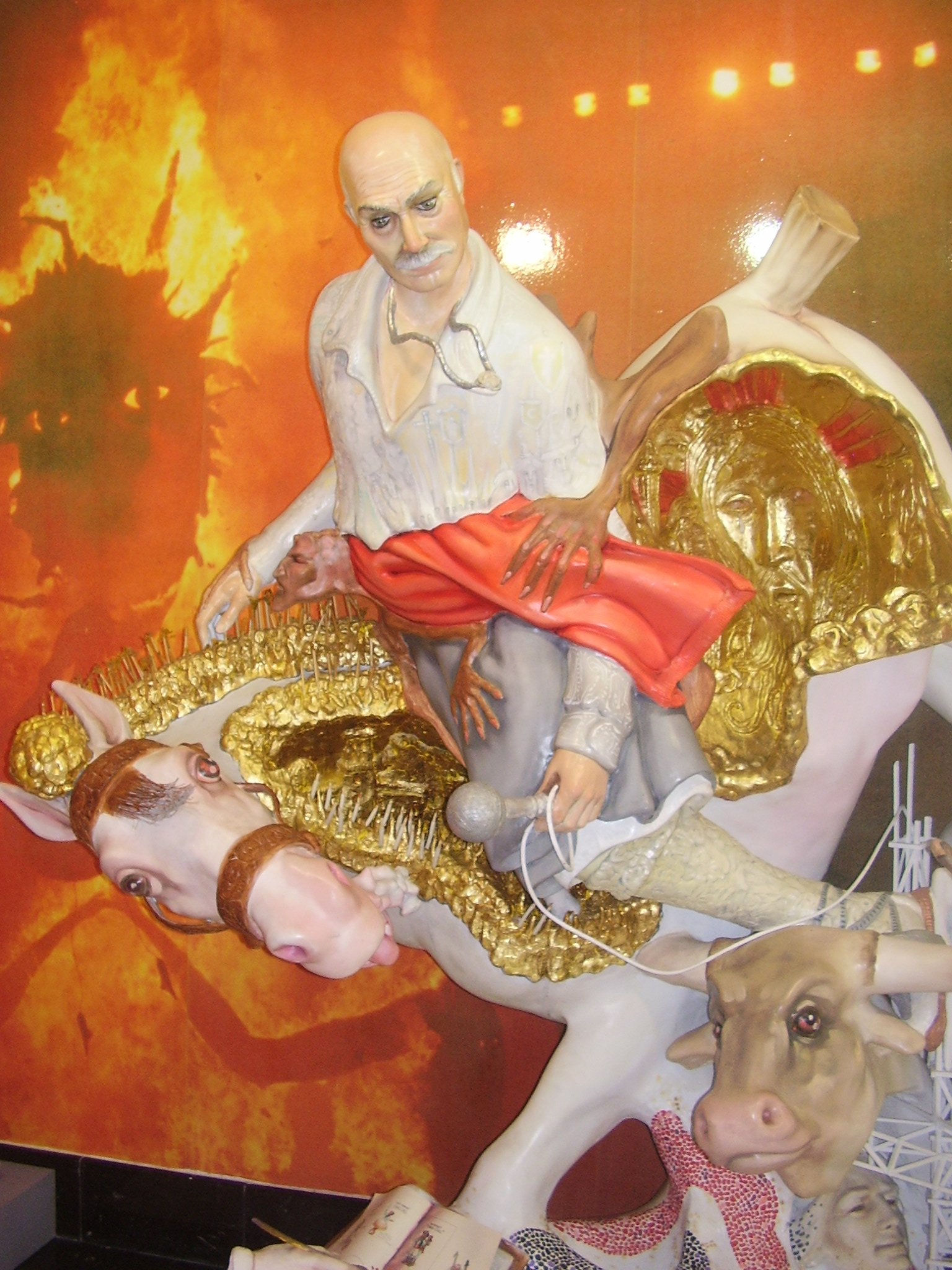 Musée de la Saint Jean Alicante